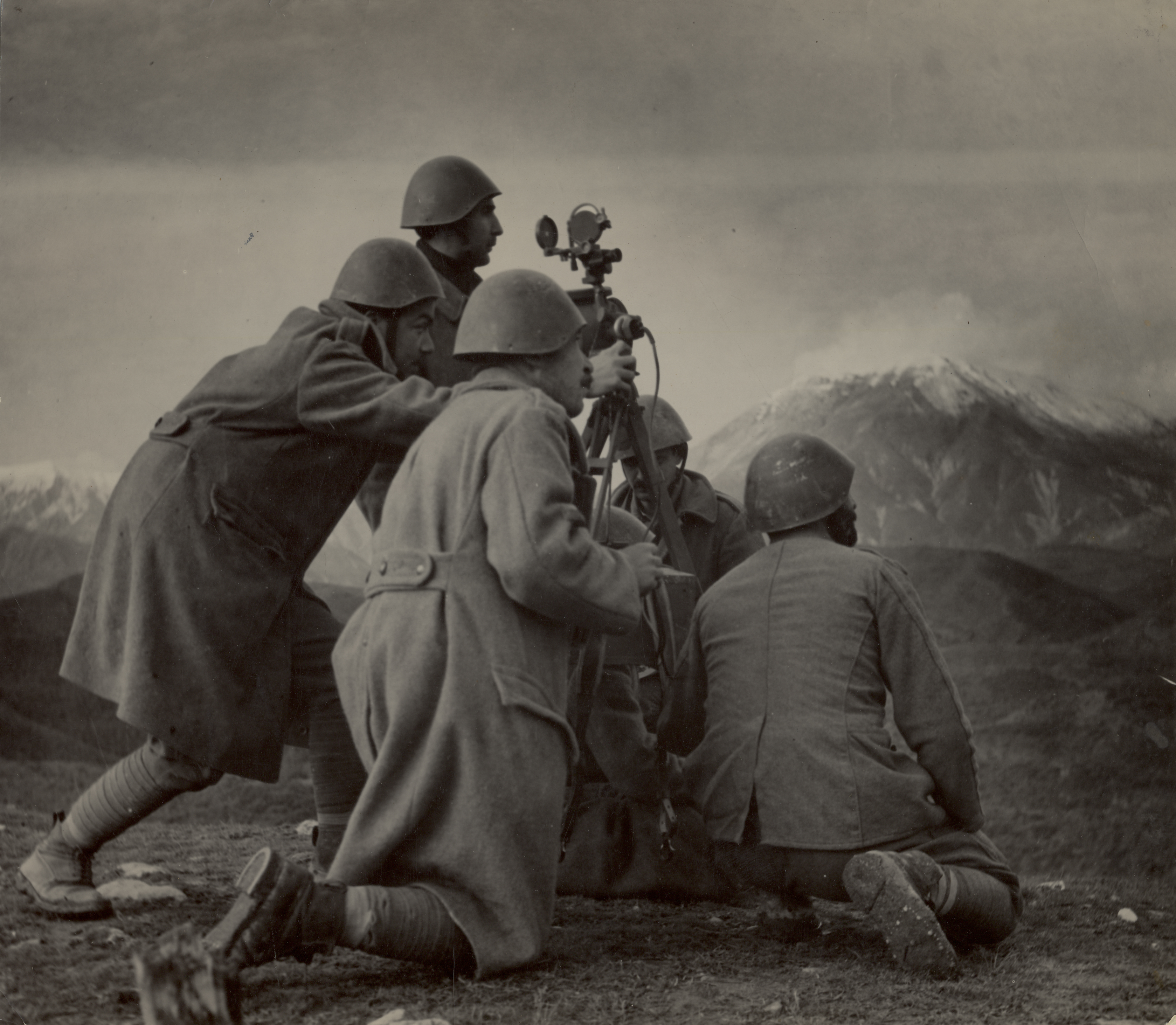 Εκδήλωση και έκθεση στο ΥΠΕΞ για τα 70 χρόνια από την κήρυξη πολέμου εναντίον της χώρας μας από τις δυνάμεις του άξονα Event and exhibition at the Foreign Ministry marking the 70th anniversary of the Axis powers’ declaration of war on Greece